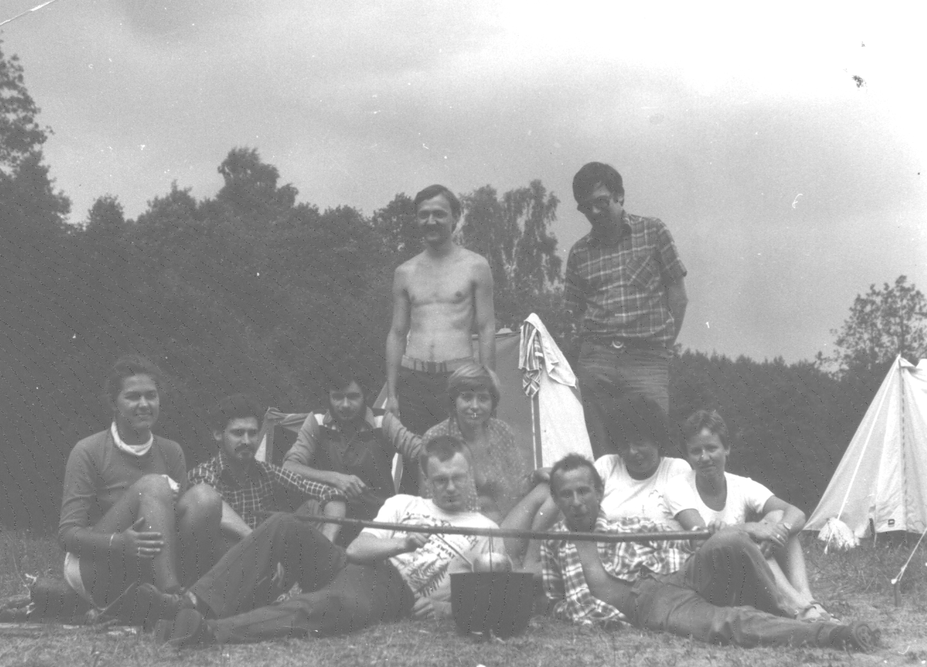 Obóz Koła Naukowego Biologów w rezerwacie U źródeł rzeki Łyny, rok 1982